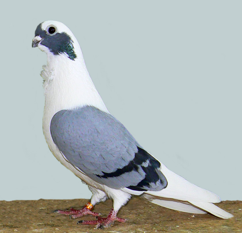 Syrian Turbiteen-Barbarisi Owl (Blue Bar)